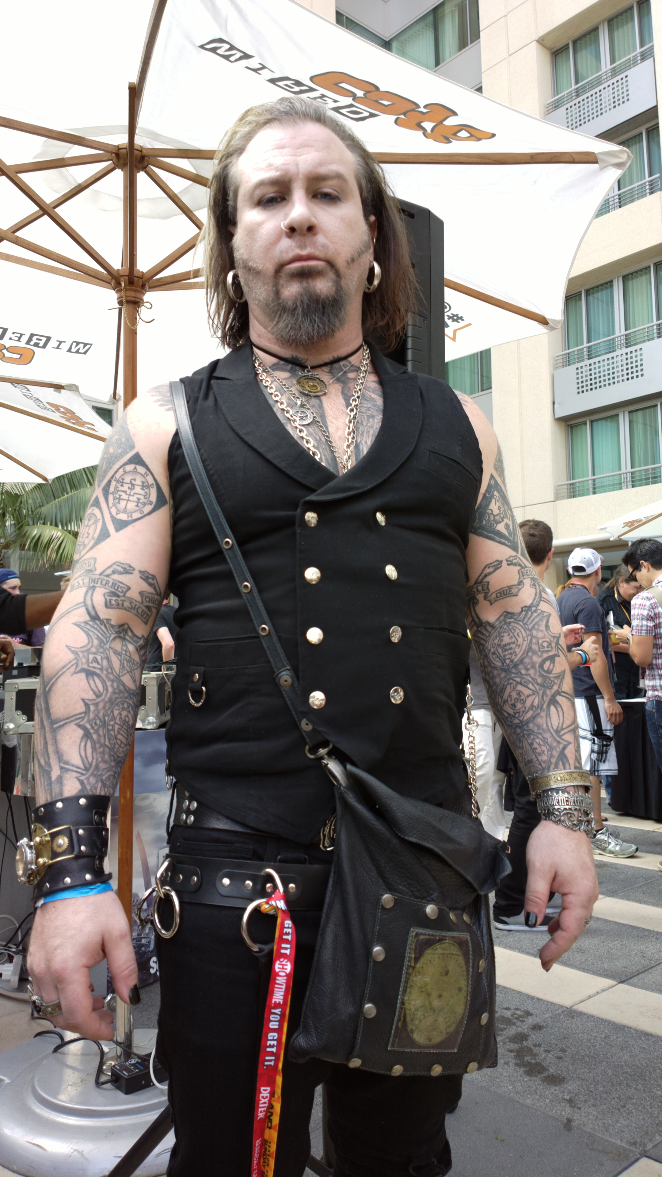 Glenn Hetrick San Diego